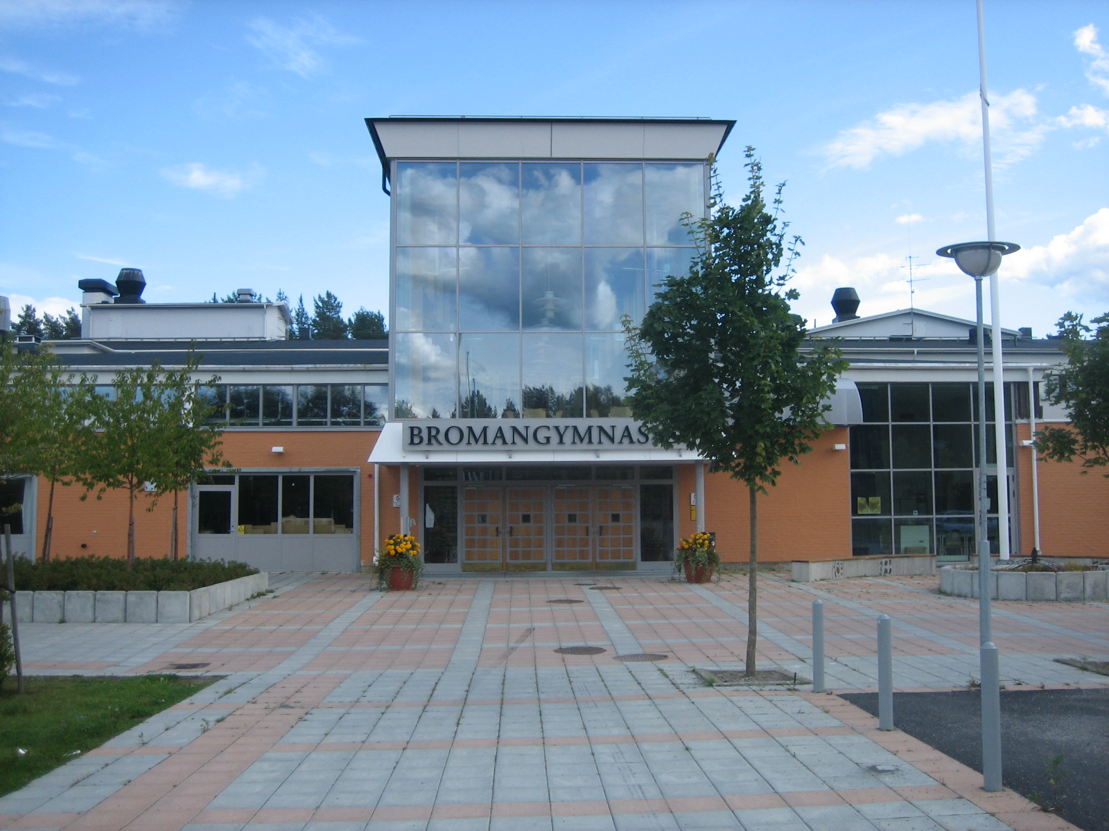 Entrén till bromangymnaiset, Hudiksvall